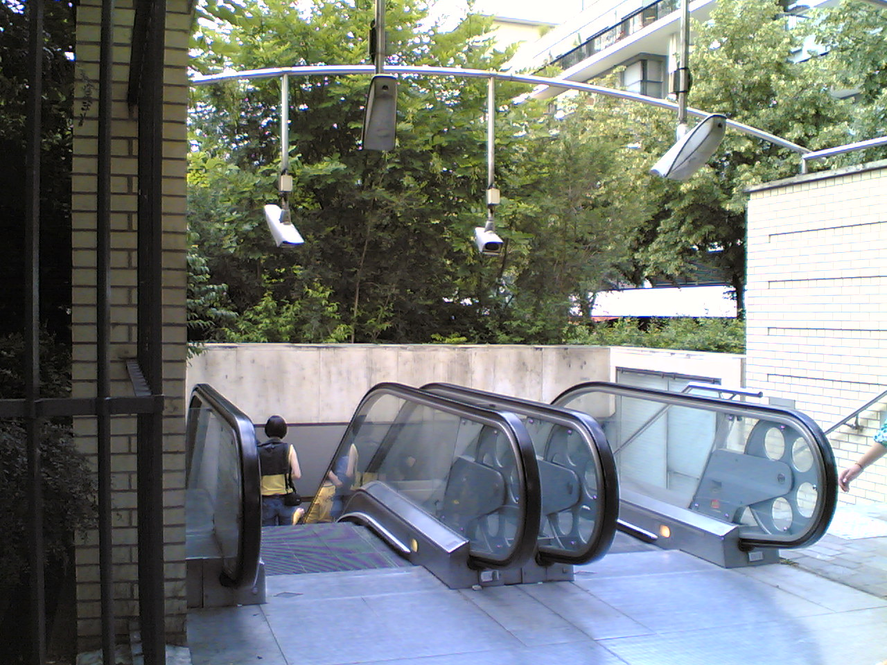 Accès extérieurs de la station Cour Saint-Emilion de la ligne 14 du métro de Paris